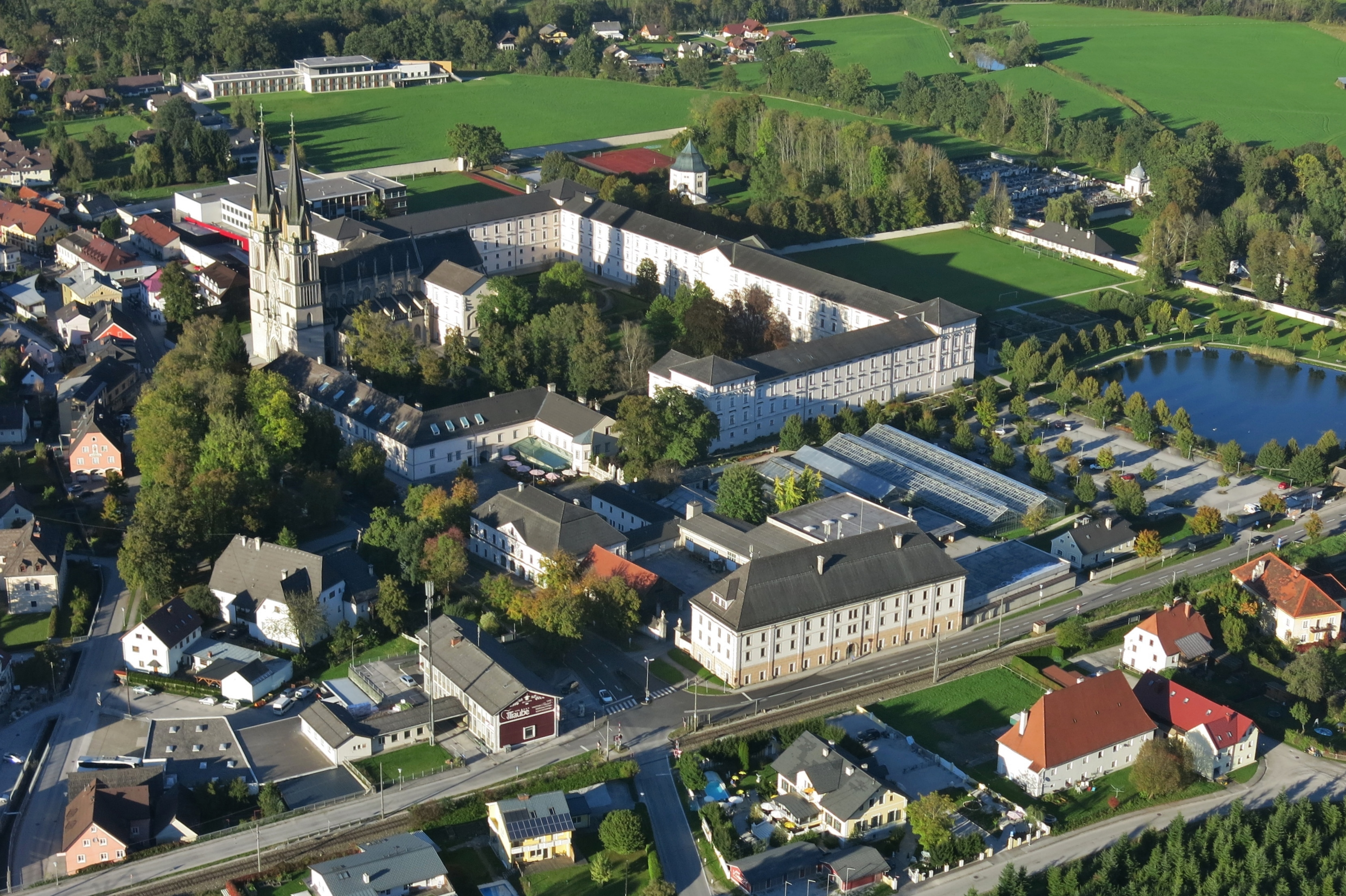 Gesamtanlage Stift Admont, mit Gärtnerei, Besucherparkplatz, Stiftsteich, Sportanlagen